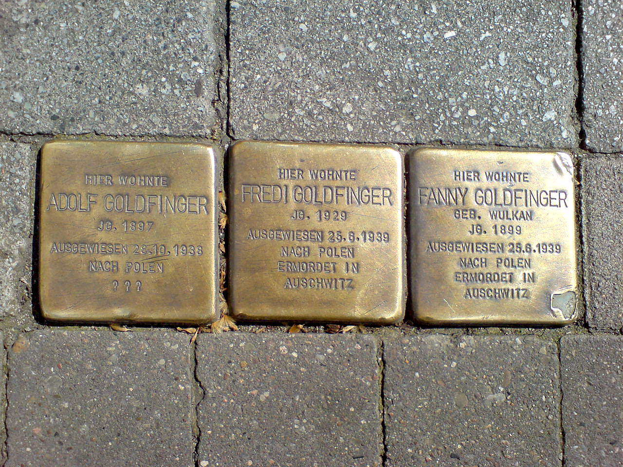 Stolpersteine am Ort Kurt-Schumacher-Straße 31; für Adolf Goldfinger, Jahrgang 1897, ausgewiesen am 28. Oktober 1938 nach Polen, verschollen; für Fredi Goldfinger, Jahrgang 1929, ausgewiesen am 25. August 1939 nach Polen, ermordet in Auschwitz; für Fanny Goldfinger, geborene Wulkan, ausgewiesen am 25. Juni 1939 nach Polen, ermordet in Auschwitz ...